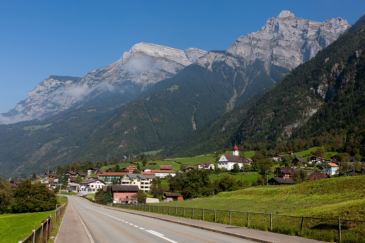 Silenen im Reusstal